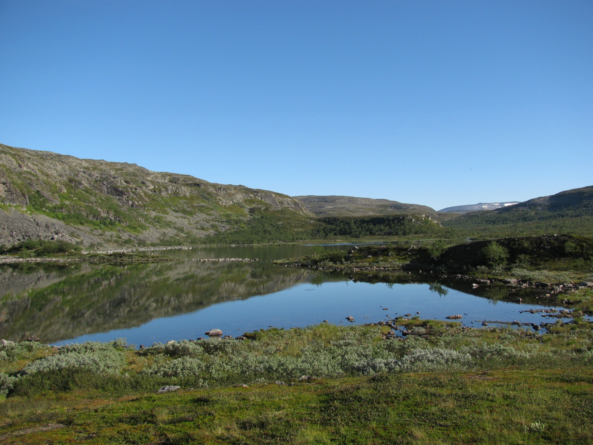 tyyni kesäaamu Meekonjärvellä